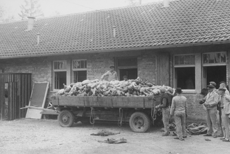 Foto 57817: Liberated prisoners pile corpses onto a cart in Dachau